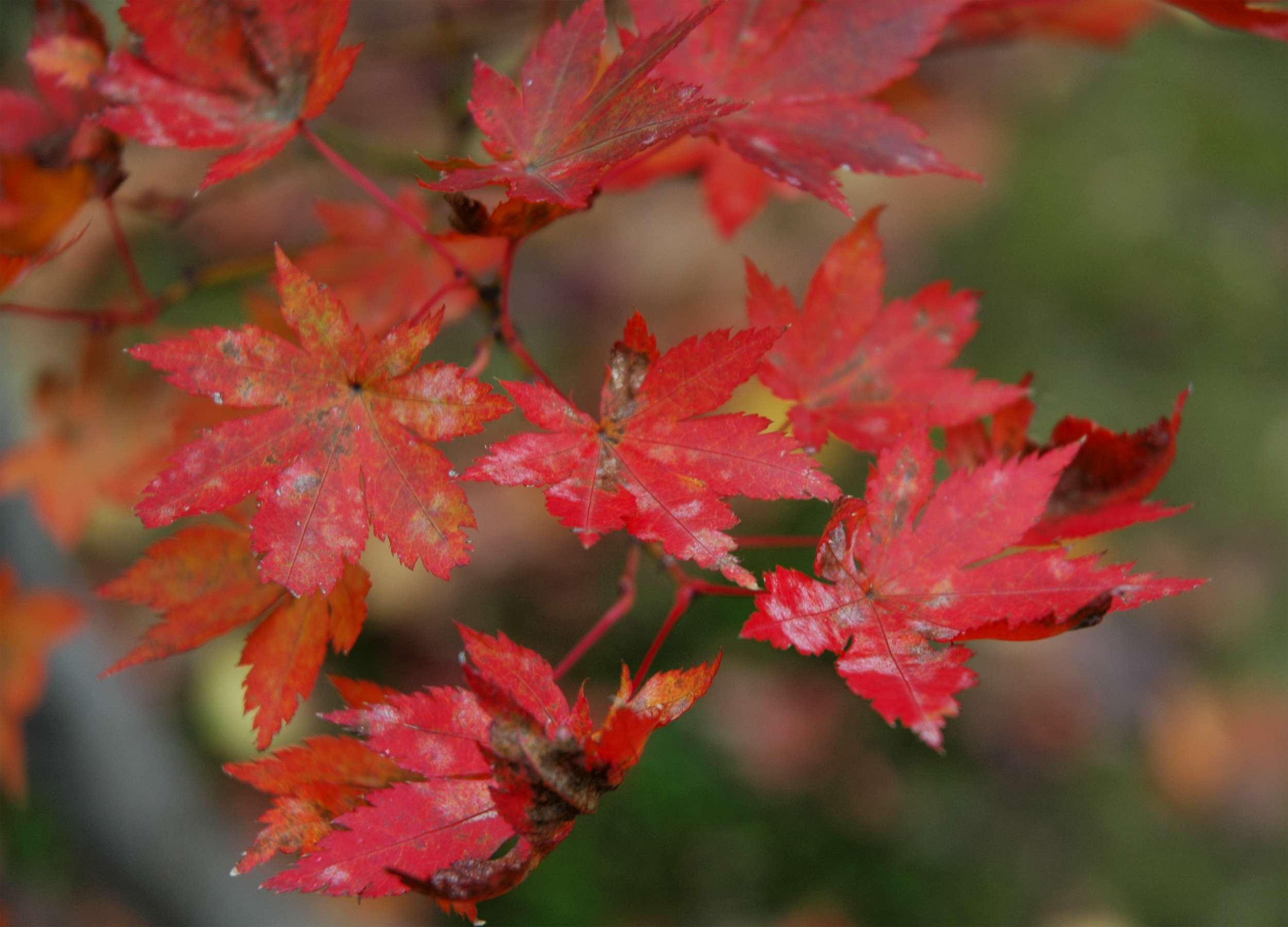 Momijien, Nagaoka, Niigata (長岡市（旧ja:越路町）のもみじ園)